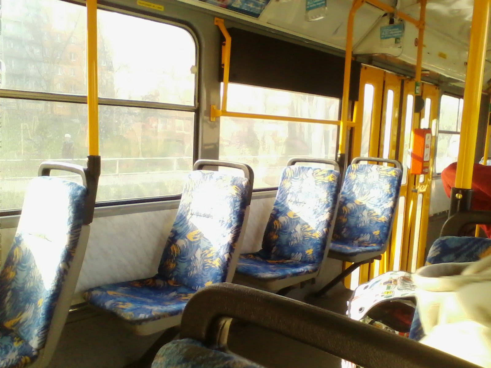 Tramvaj DPO.